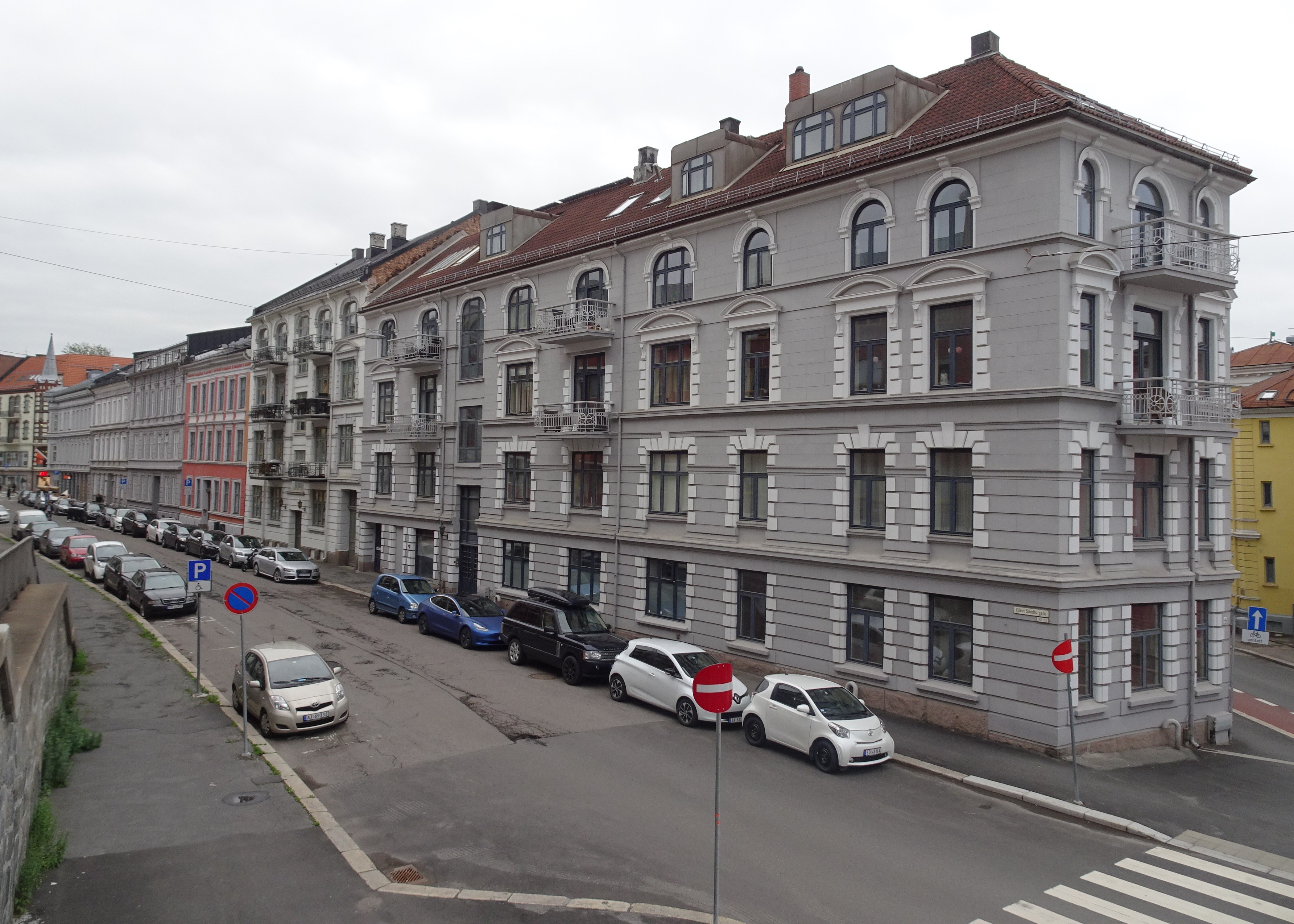 Nordøstenden av Eilert Sundts gate